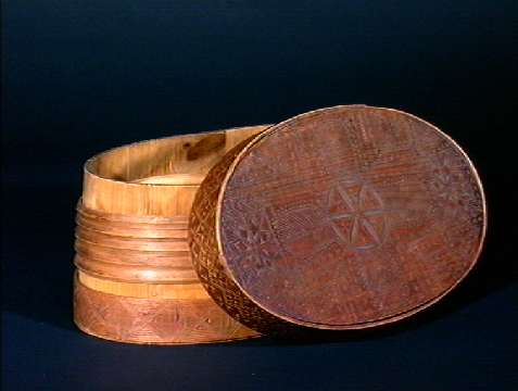 Øskje med lagget korpus og sveipet lokk. Den er datert 1805 og har trolig vært brukt til smør eller ost. Øskjen er dekorert med karveskurd og har innskriften OLS Ao 1805. Den er innkommet fra Nittedal i Akershus. Lengde 30 cm. Foto Anne-Lise Reinsfelt/Norsk Folkemuseum, NF.1926-0490.